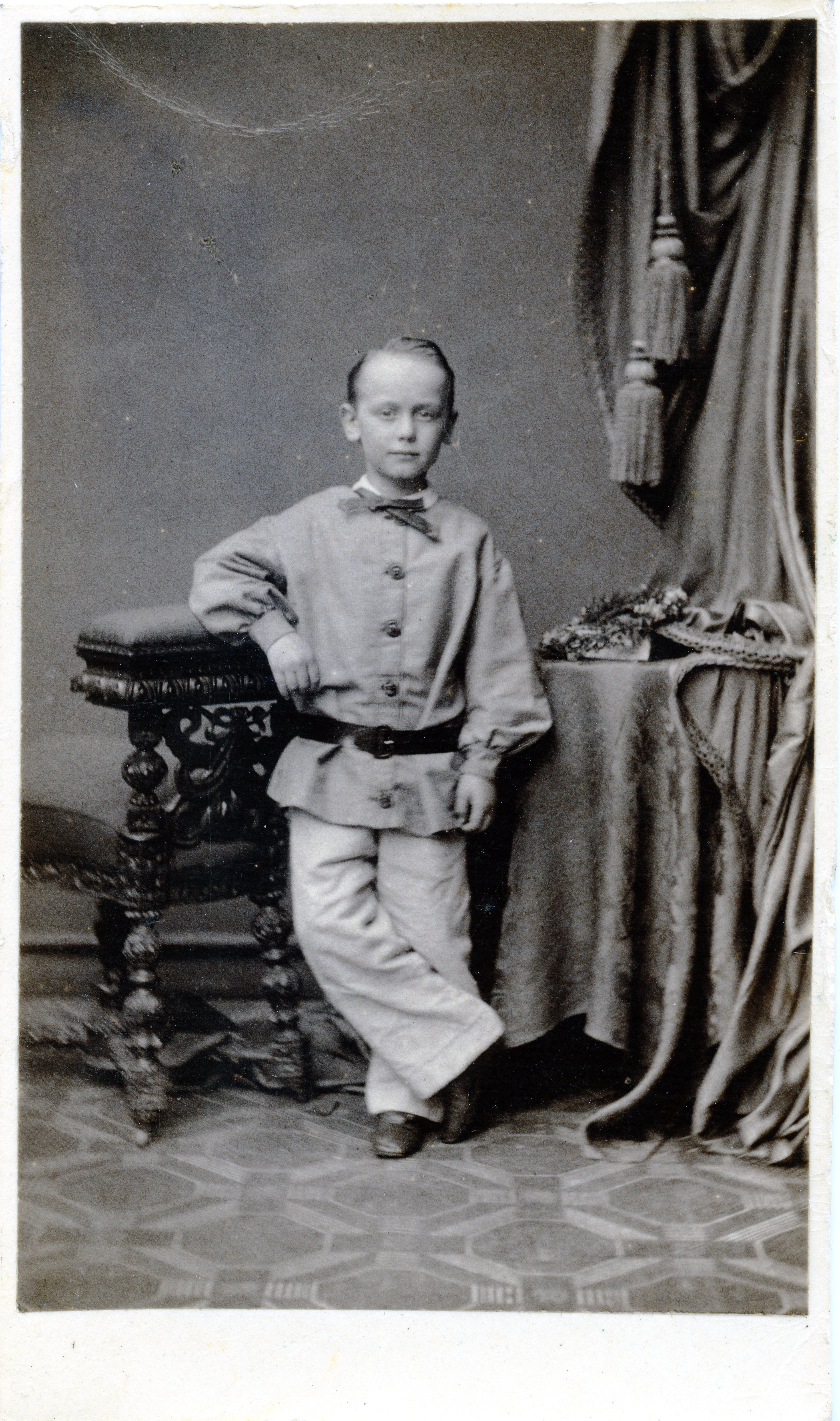 Ganzkörperporträt des jungen Johannes Merck in legeren Anzug; die Beine sind überkreuzt, der rechte Arm auf einem Hocker abgestützt; im Hintergrund ein drapierter Vorhang und ein Tisch. Johannes Theodor Merck (* 14. Mai 1855 in Manchester; † 10. April 1934 in Hamburg)[1]